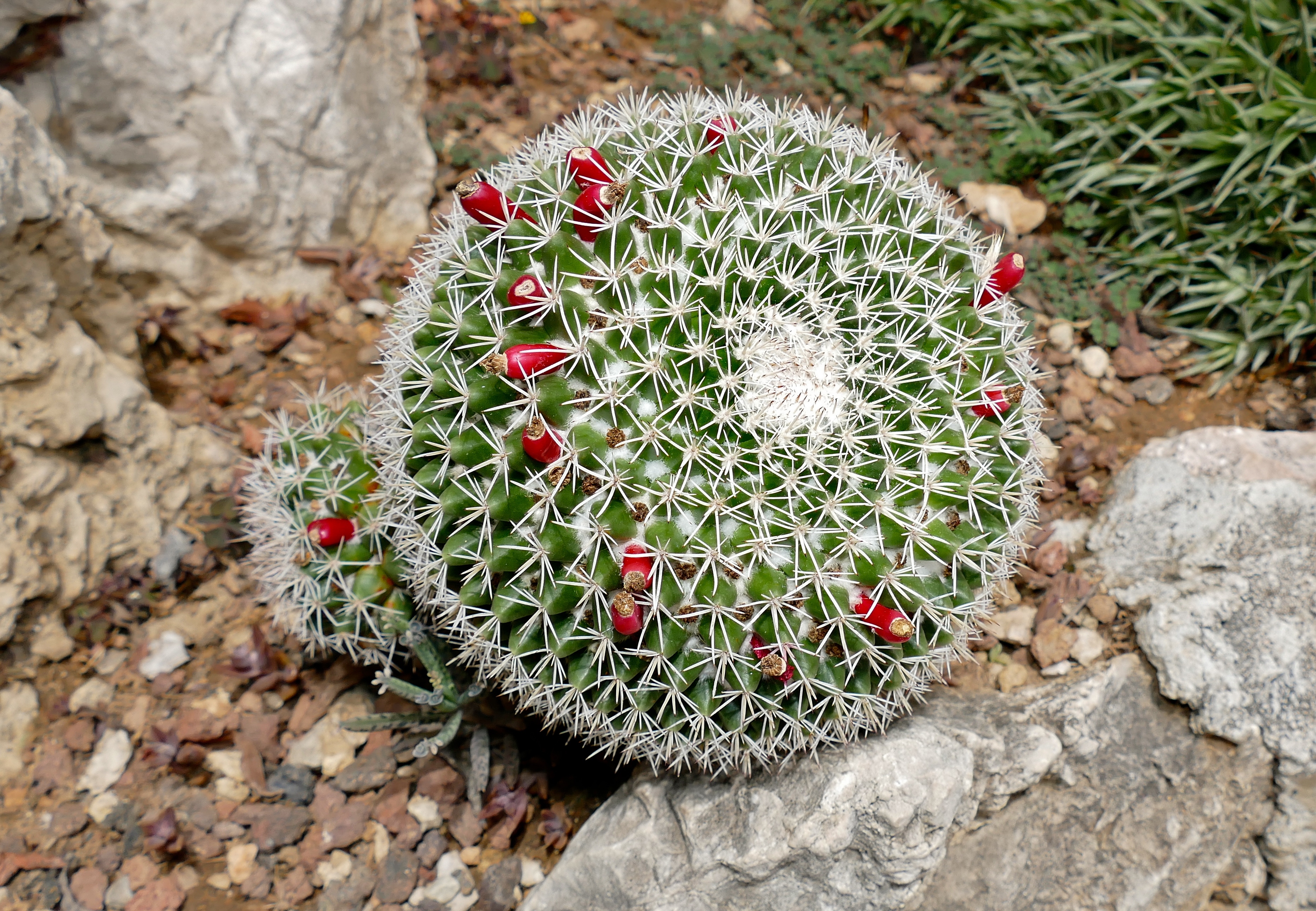 Jardin Exotique, MONACO